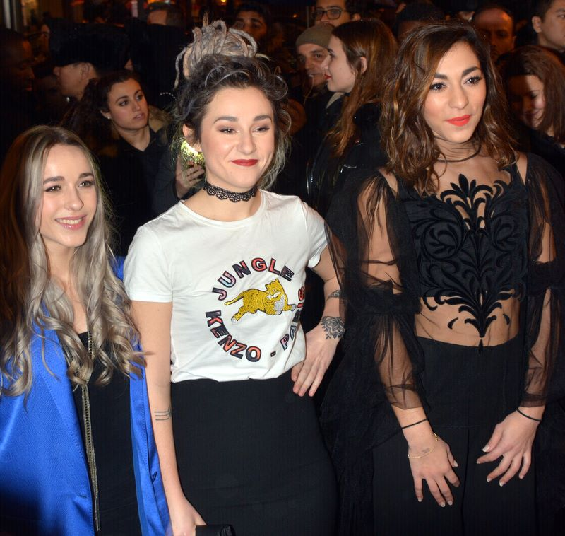 Les LEJ à la cérémonie des Globes de cristal